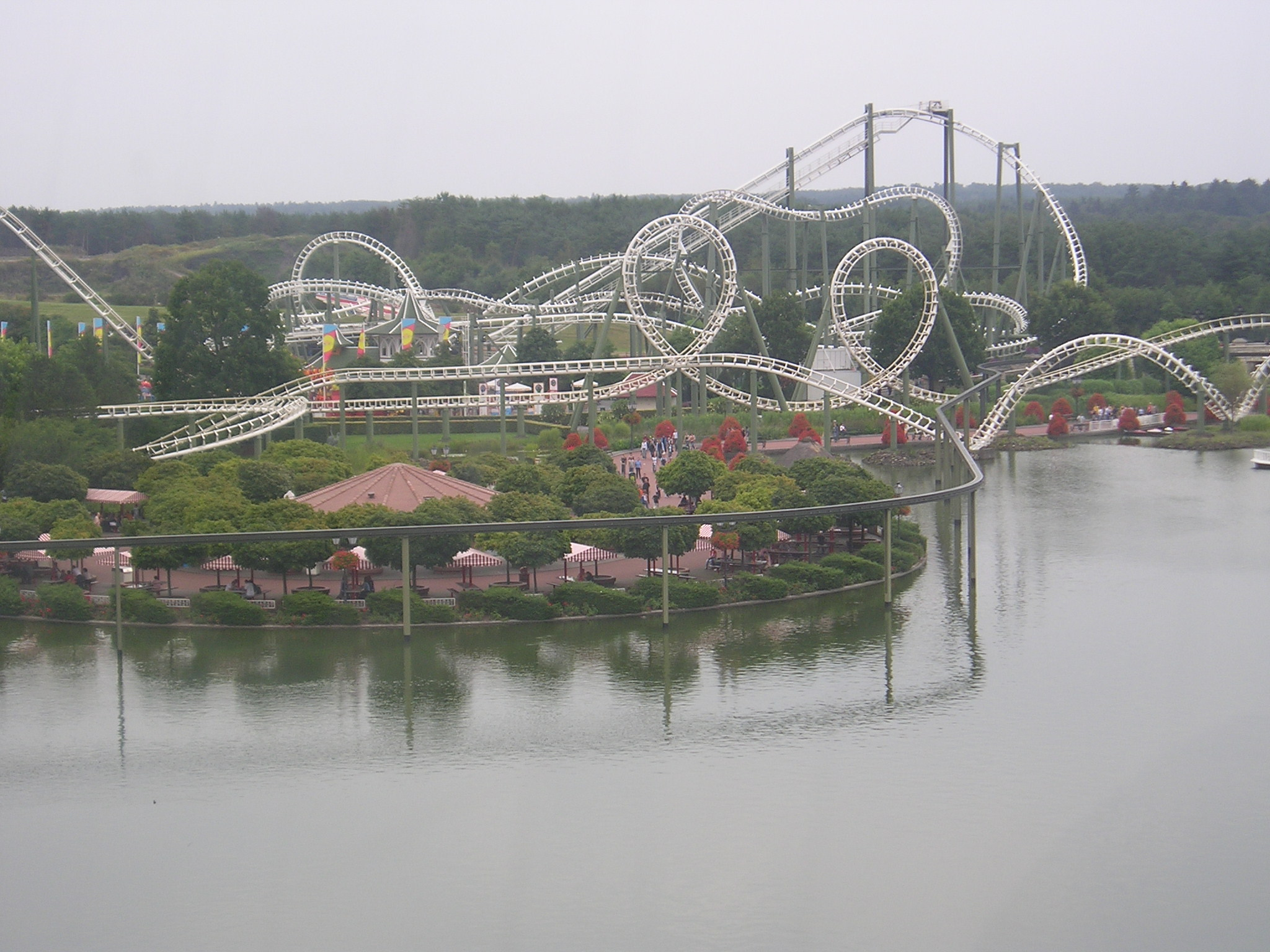 Big Loop und Limit vom Aussichtsturm aus, Heide-Park Soltau